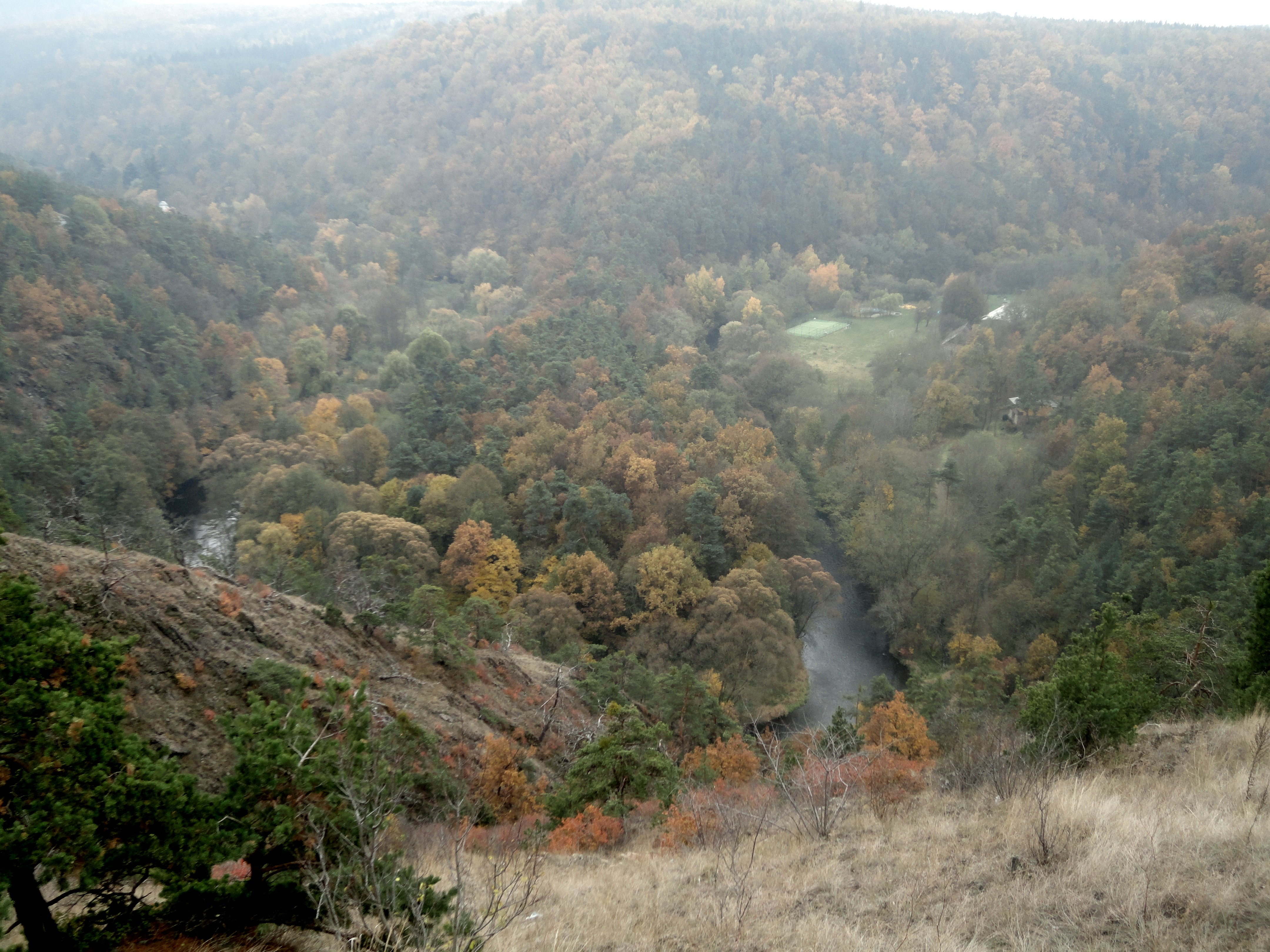 Mohelenská hadcová step